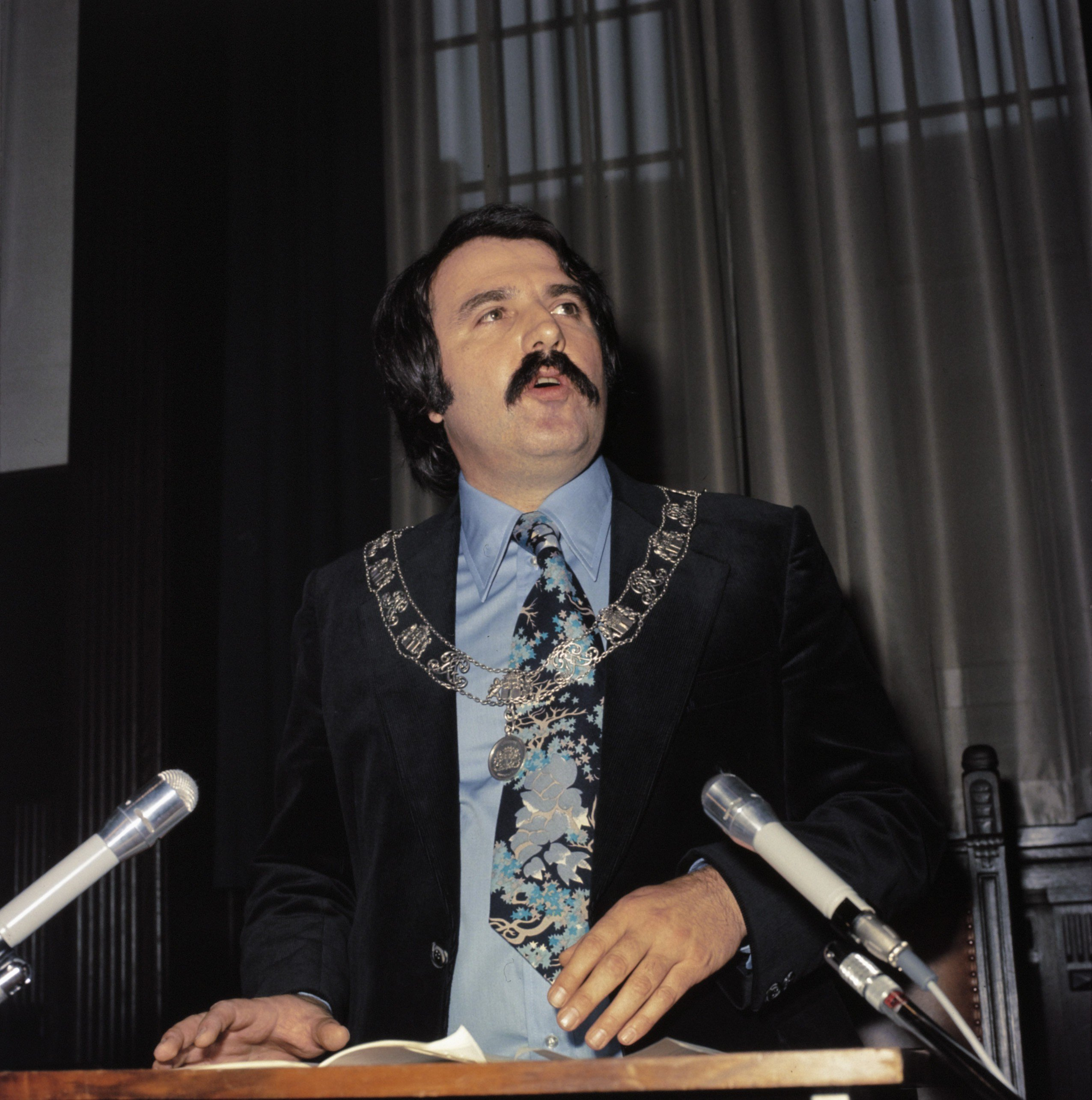 Collectie / Archief : Fotocollectie Anefo Reportage / Serie : [ onbekend ] Beschrijving : Installatie Andre v.d. Louw als burgemeester van Rotterdam; Andre v.d. Louw aan het woord Datum : 1974 Locatie : Rotterdam, Zuid-Holland Trefwoorden : burgemeesters Persoonsnaam : Andre v.d. Louw Fotograaf : Mieremet, Rob / Anefo Auteursrechthebbende : Nationaal Archief Materiaalsoort : Dia (kleur) Nummer archiefinventaris : bekijk toegang 2.24.01.07 Bestanddeelnummer : 254-9551